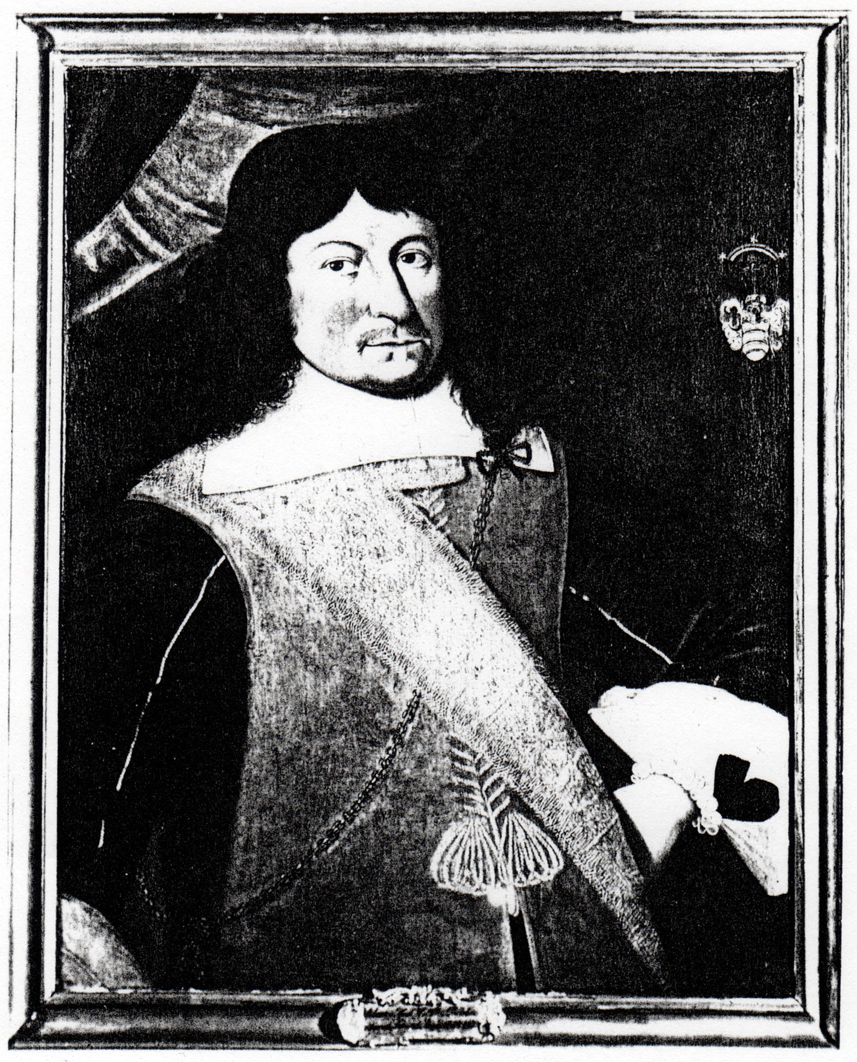 Adam von Pfuel (1604–1659), schwedischer General, sowie später Geheimer Kriegsrat und General-Kriegskommissar in dänischem Dienst.